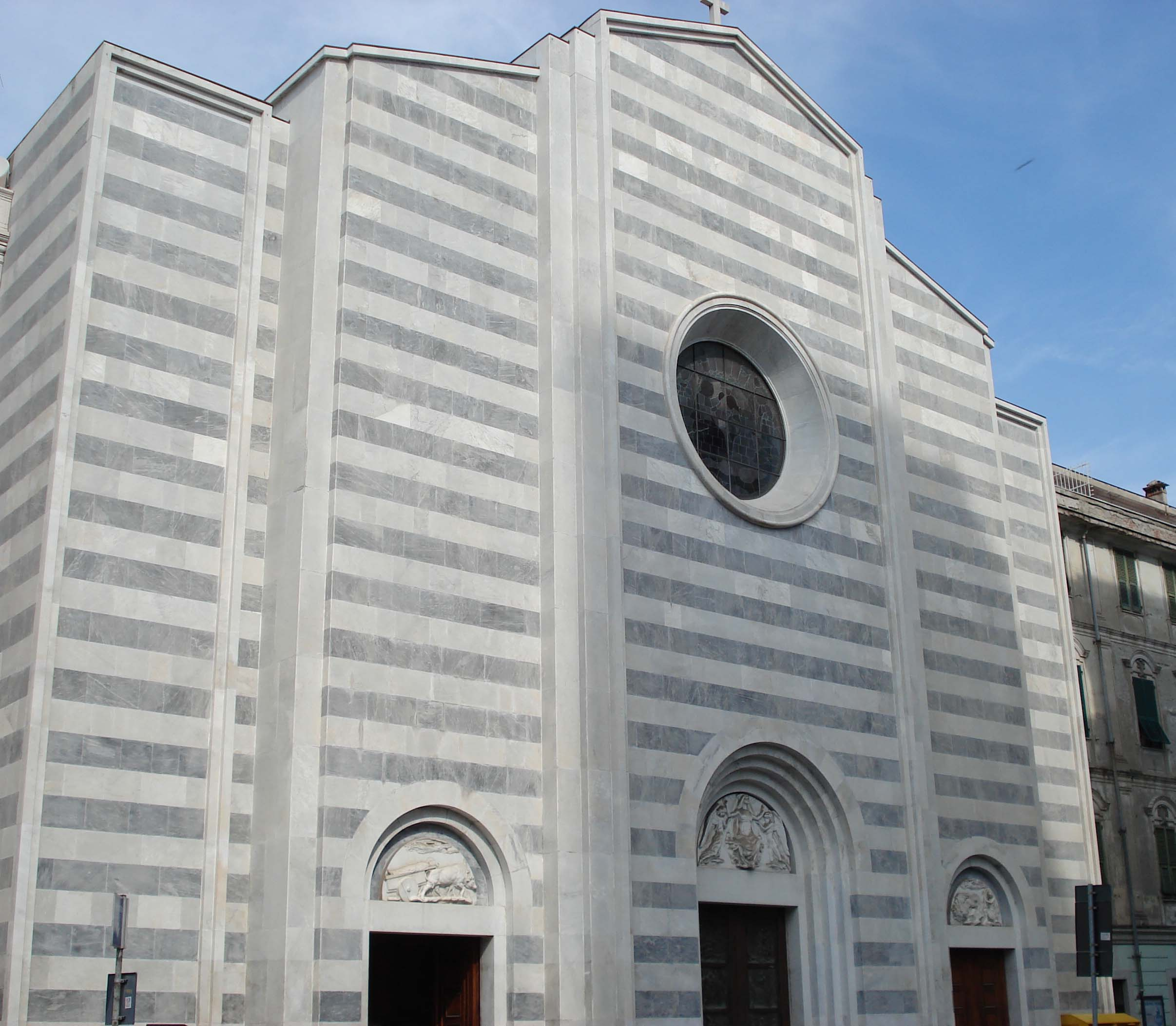 Chiesa di Santa Maria Assunta, La Spezia, Italia.